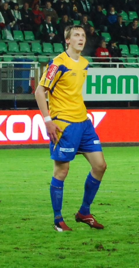 Thomas Braaten, fotballspiller hos Alta IF.